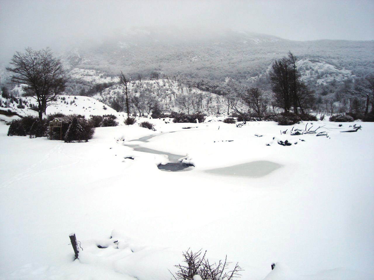 Parc National Tierra del Fuego, Ushuaia, en hiver